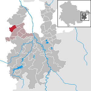 Lindenkreuz in Thuringia - District Greiz